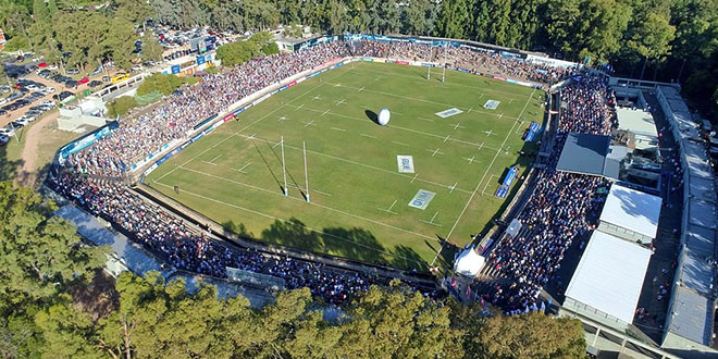 Estadio Charrúa - Partido de Eliminatorias entre Los Teros y Canadá rumbo a la Copa del Mundo de Japón 2019